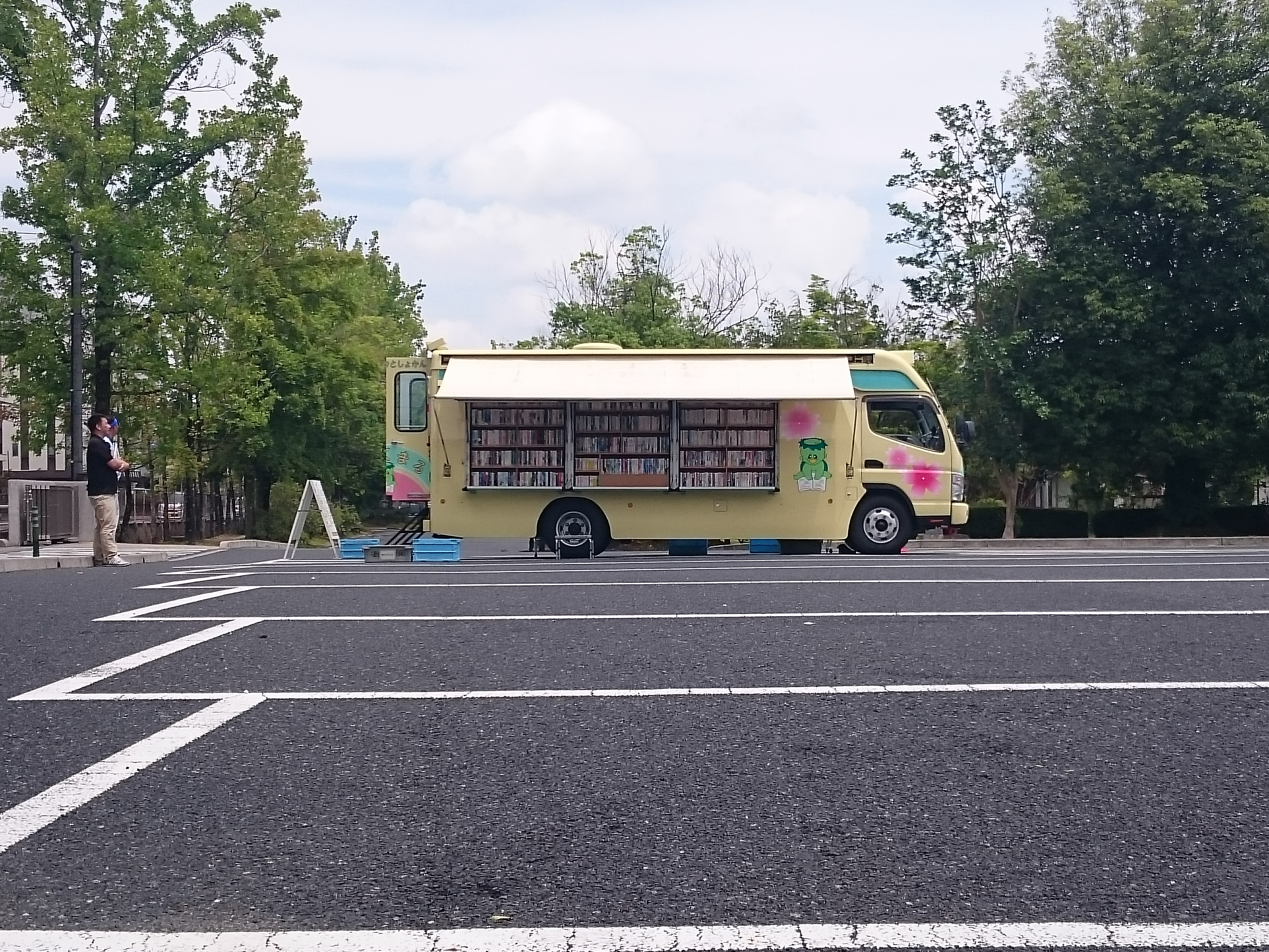 津山市立図書館の自動車文庫の2代目「ぶっくまる」